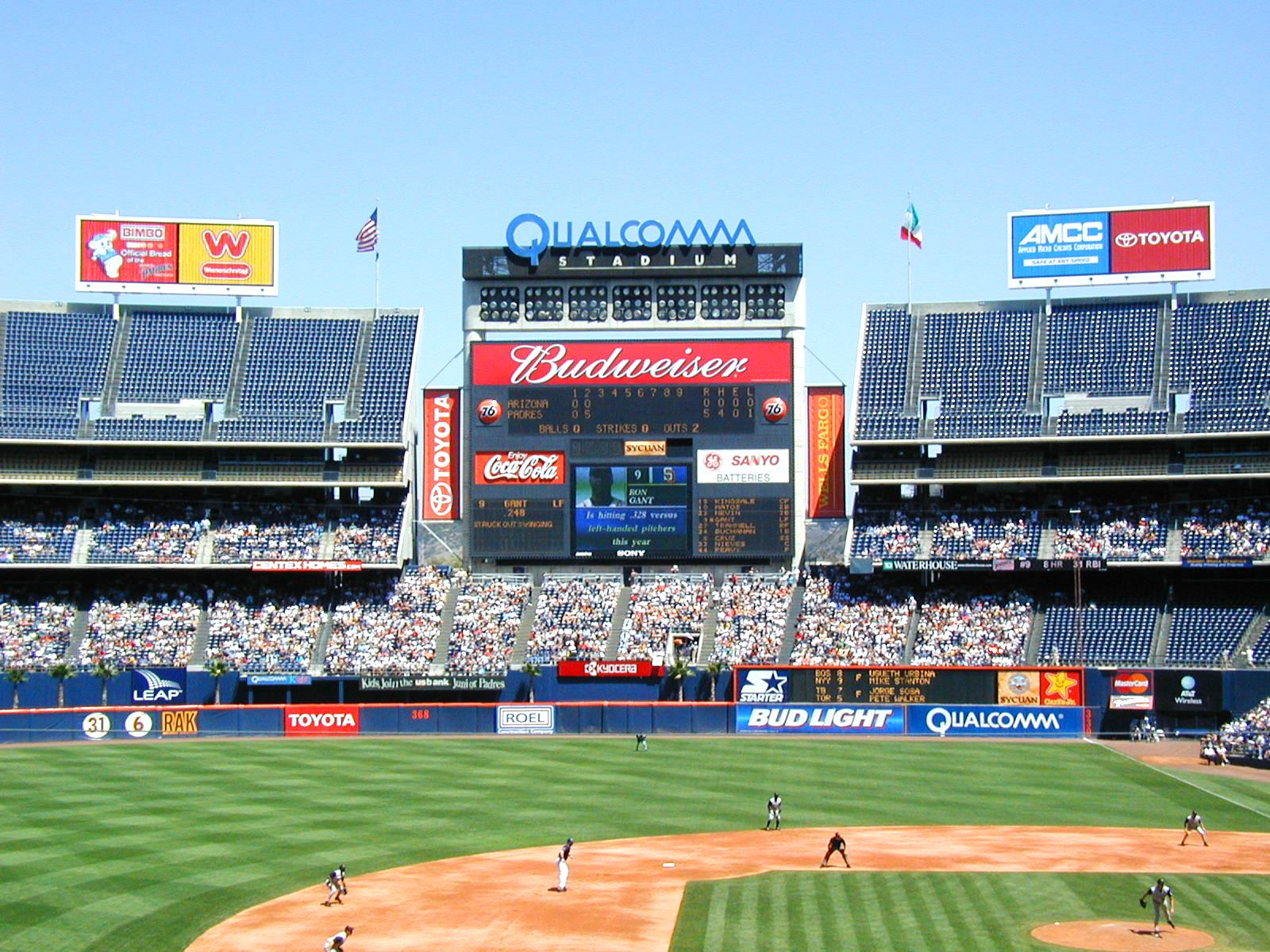 San Diego Qualcomm Stadium